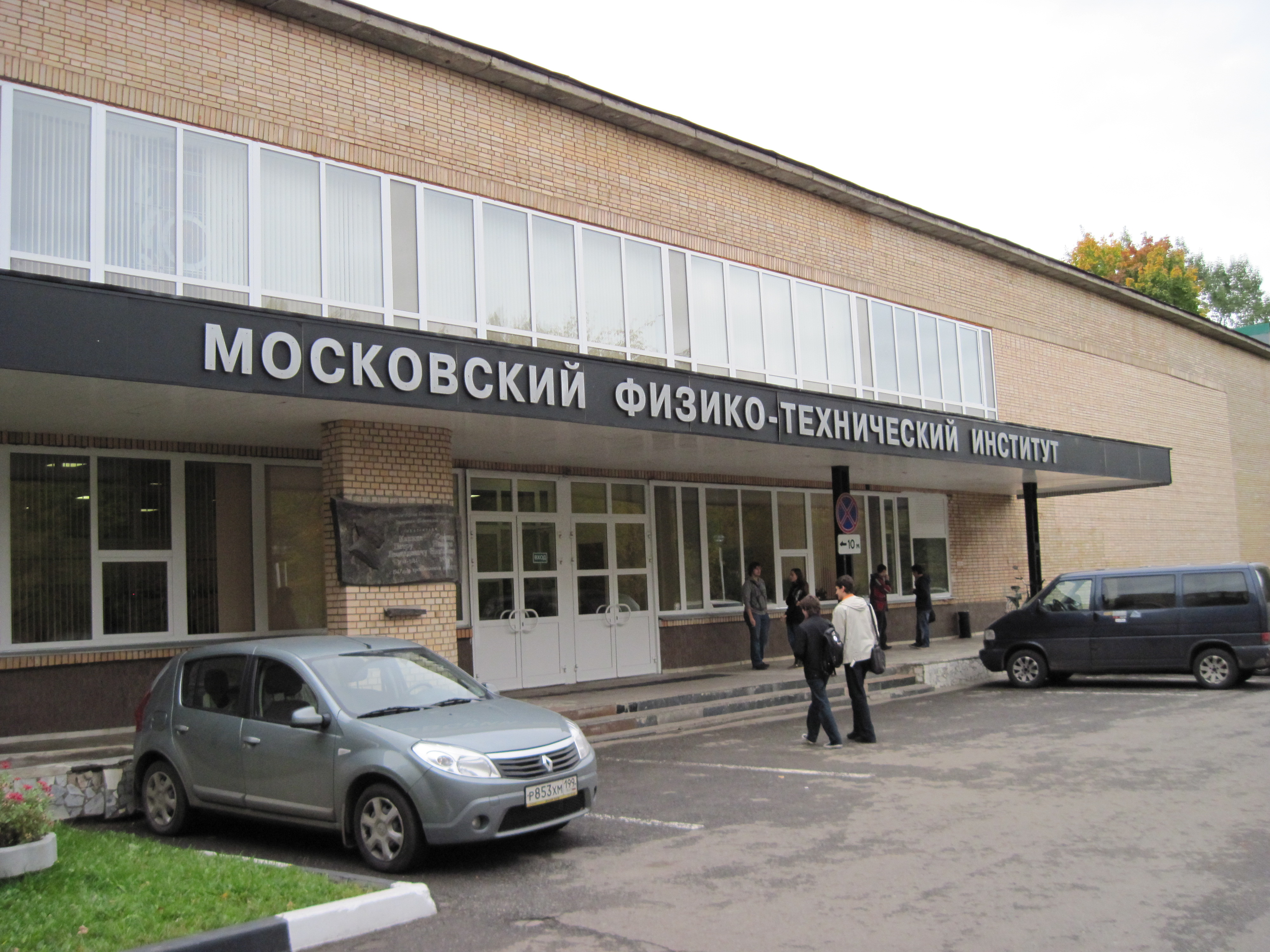 Вход в главный корпус МФТИ